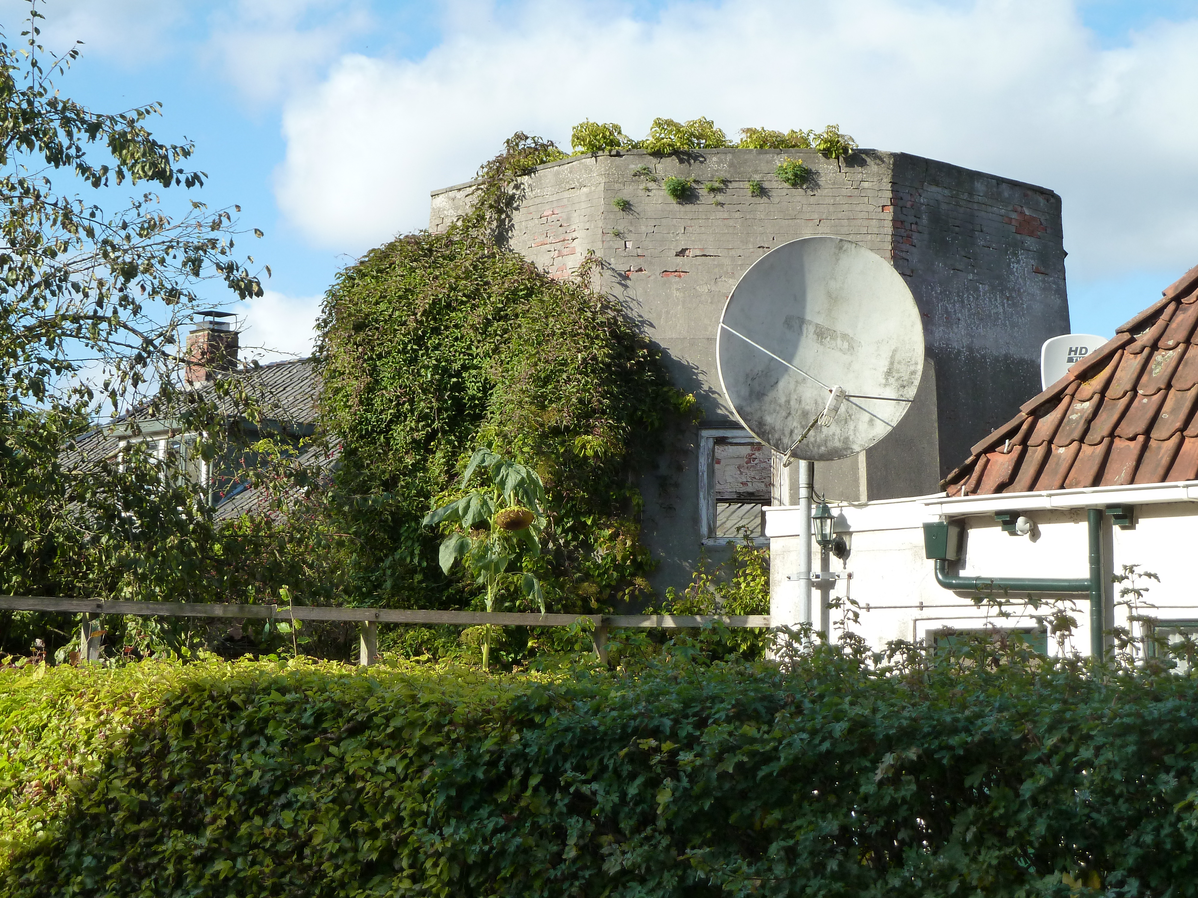 Restant van de korenmolen Doornbos in Huizinge (Groningen, Nederland).